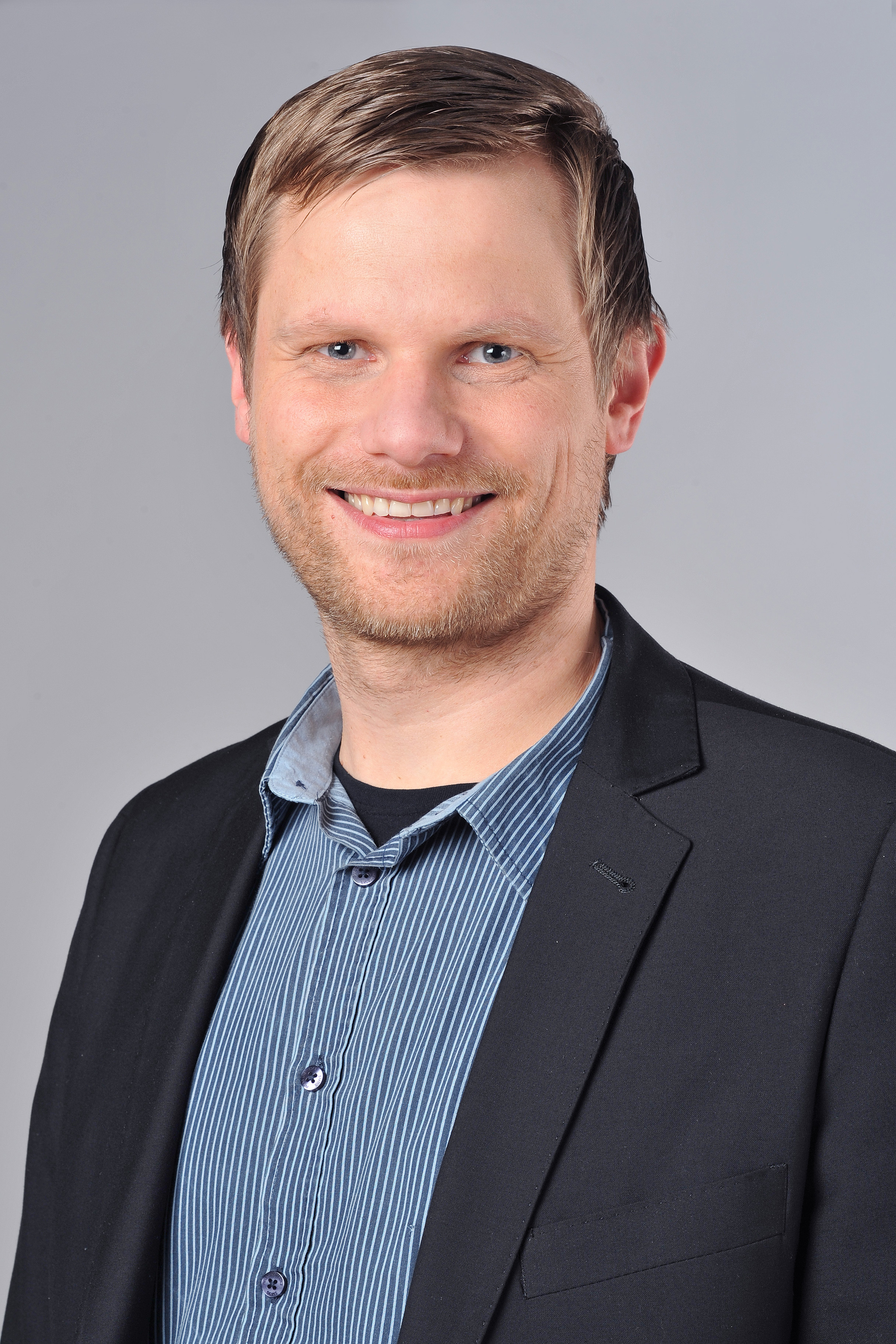 Landtagsprojekt Nordrhein-Westfalen 27. - 29. November 2013 Dirk Schatz